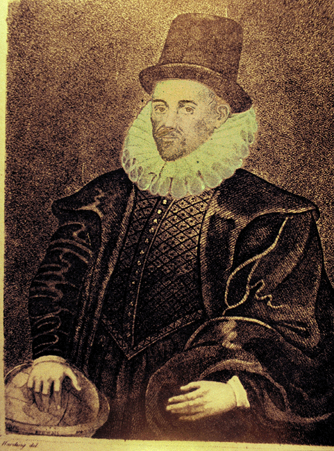 William Gilbert (1544-1603). Fra forsida av hans verk De magnete (1600)